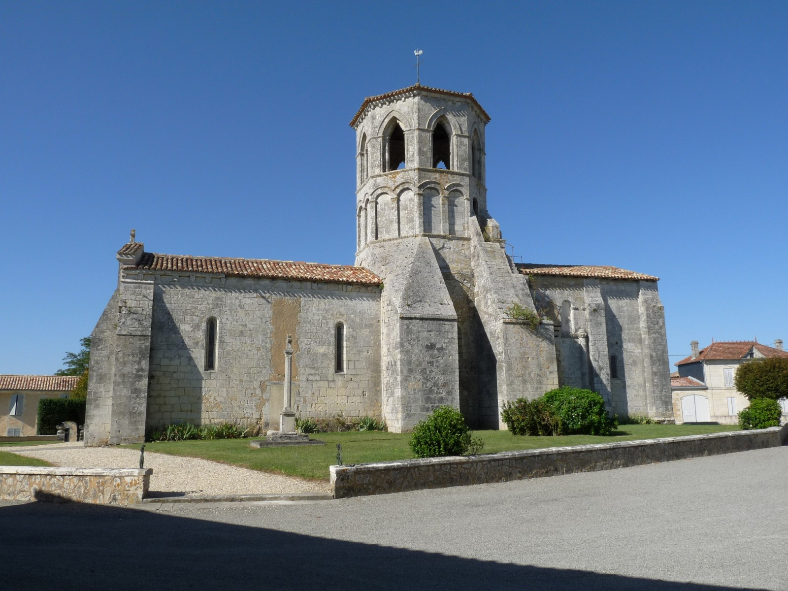 Eglise de Rouffignac, Charente-Maritime, France